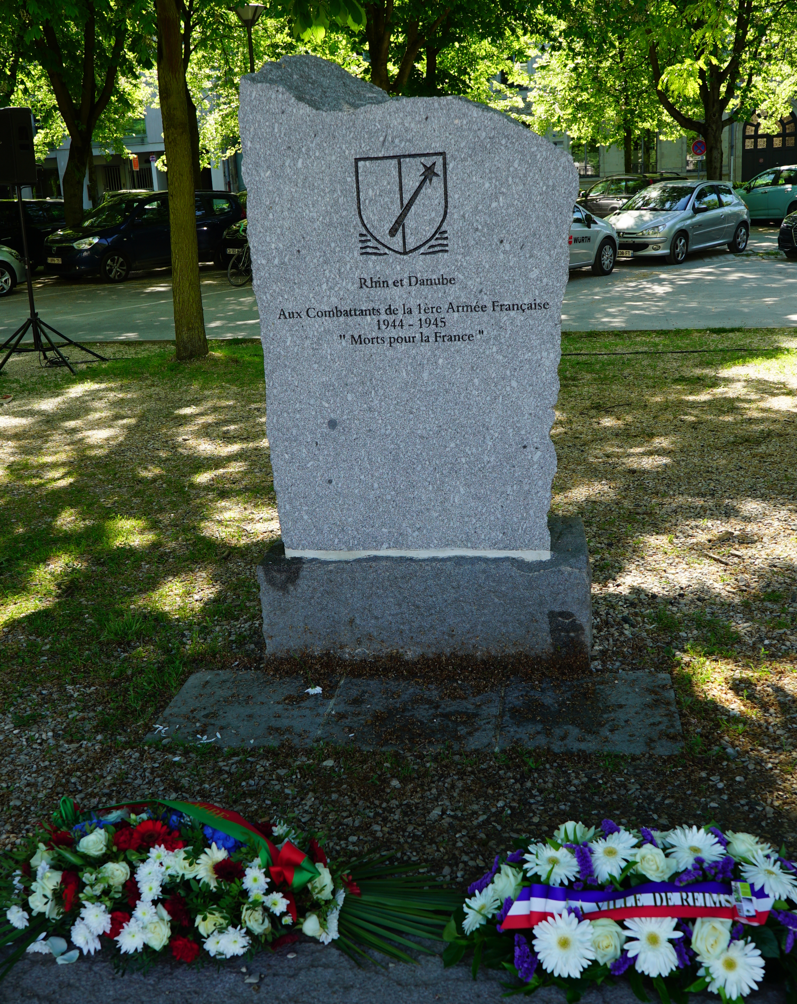 lors du 8 mai 2018.